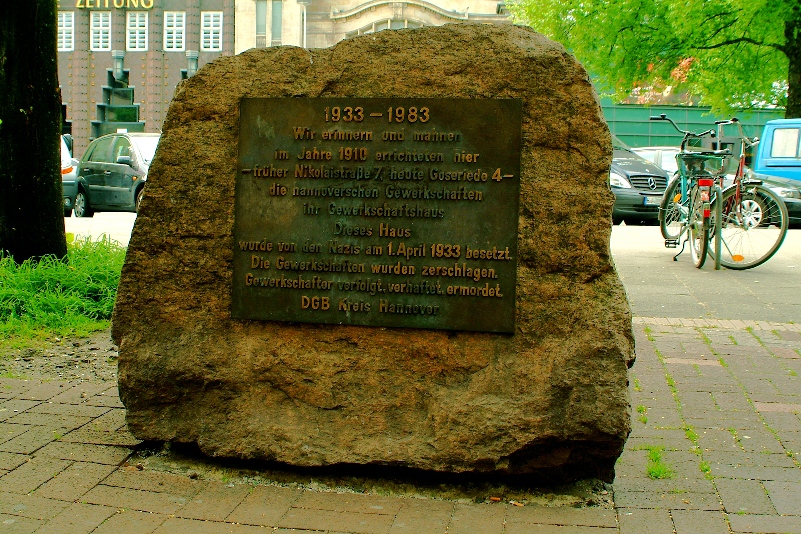 Nikolaistraße 7 Goseriede 4 Hannover Tiedthof Mahnmal Gewerkschaftshaus DGB Kreis Hannover